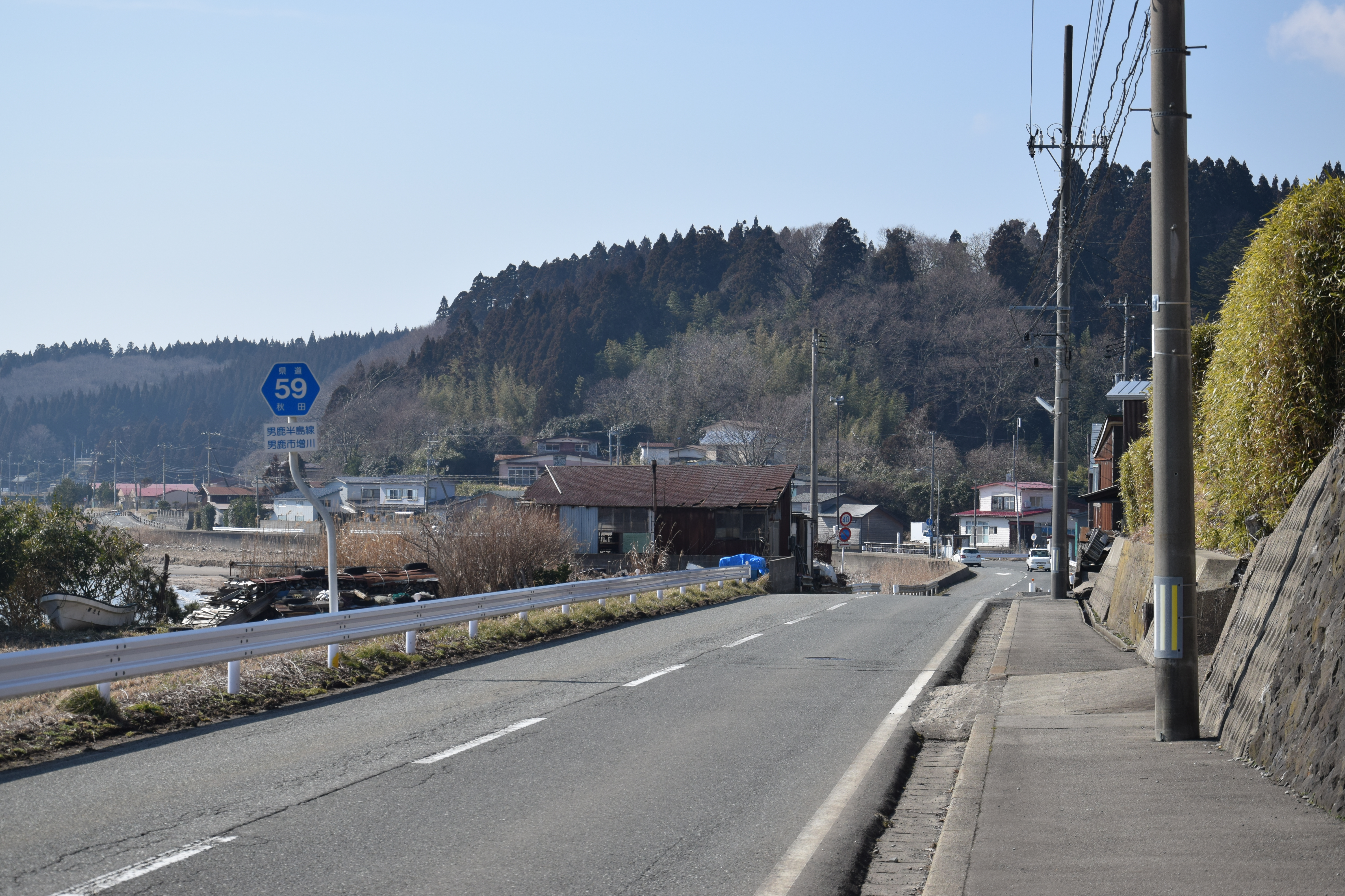 秋田県道59号男鹿半島線（男鹿市船川港増川 2019年） Nikon D5300